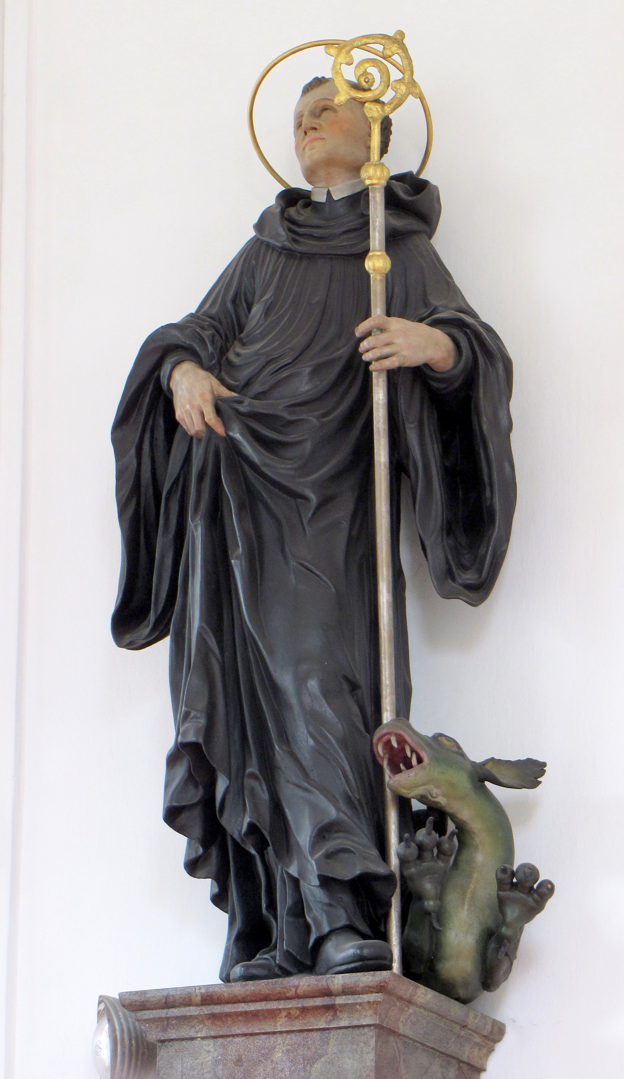 Figur des Hl. Magnus von Johann Hops in der Filialkirche St. Michael in Pfronten-Steinach